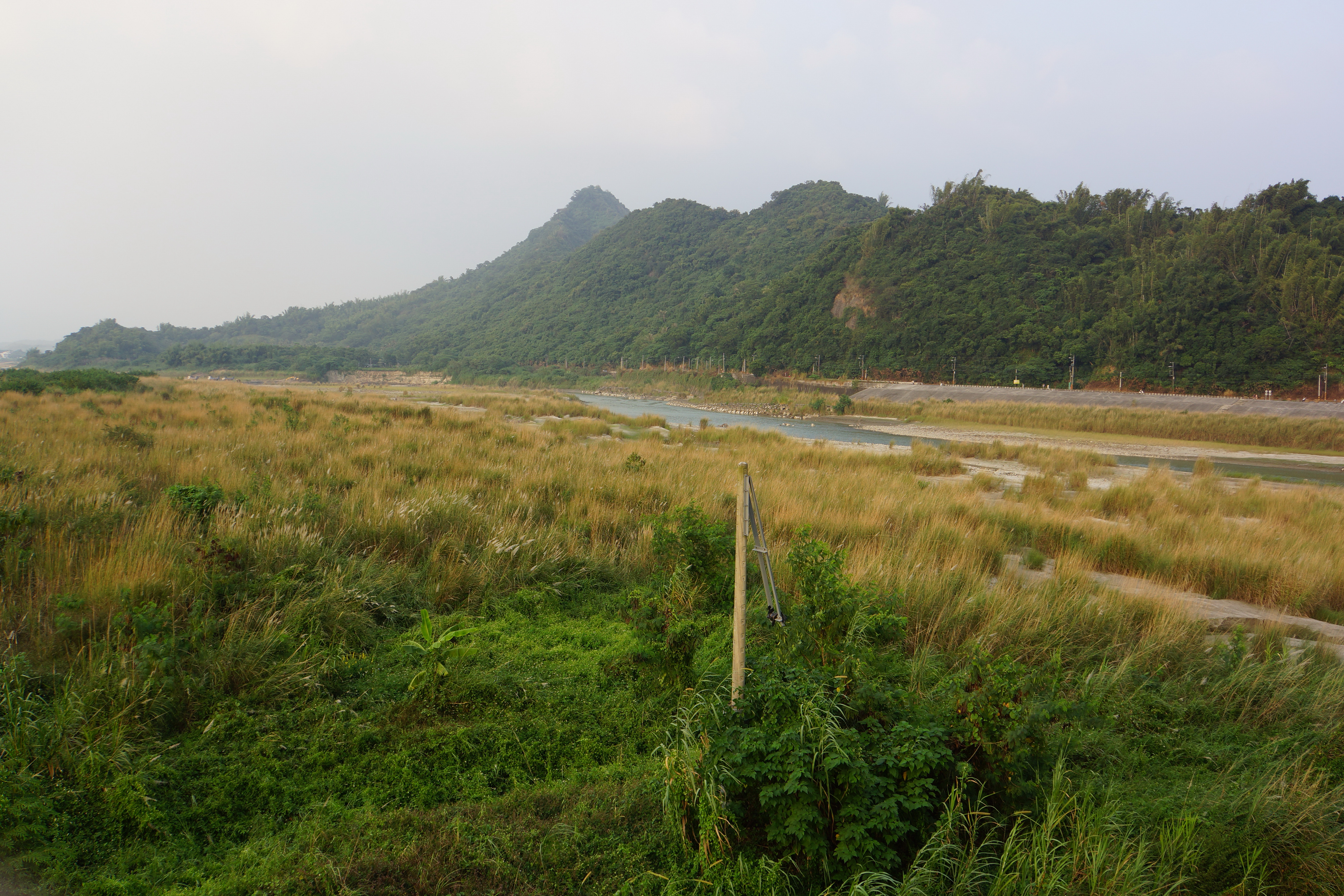 旗尾山 Qiwei Mountain